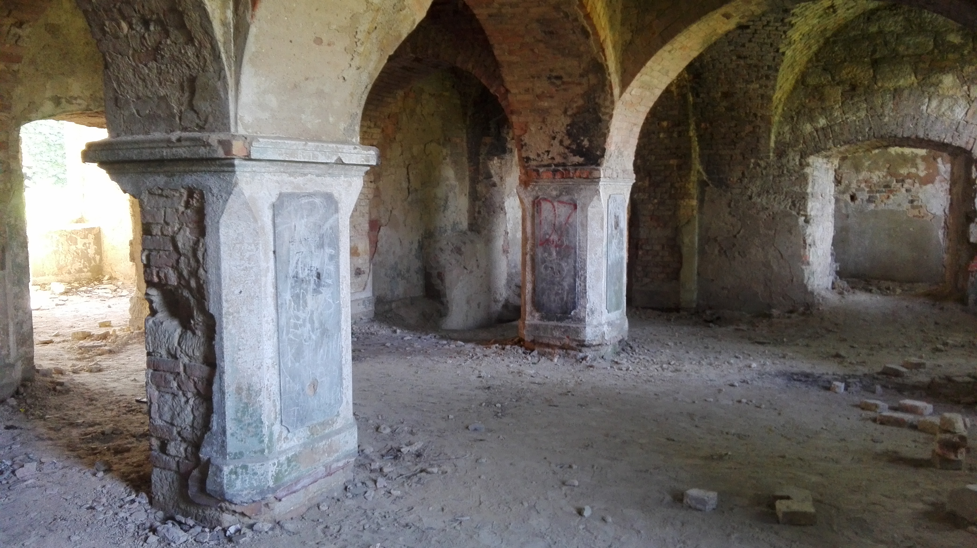 Prawdopodobnie dawny refektarz klasztorny.